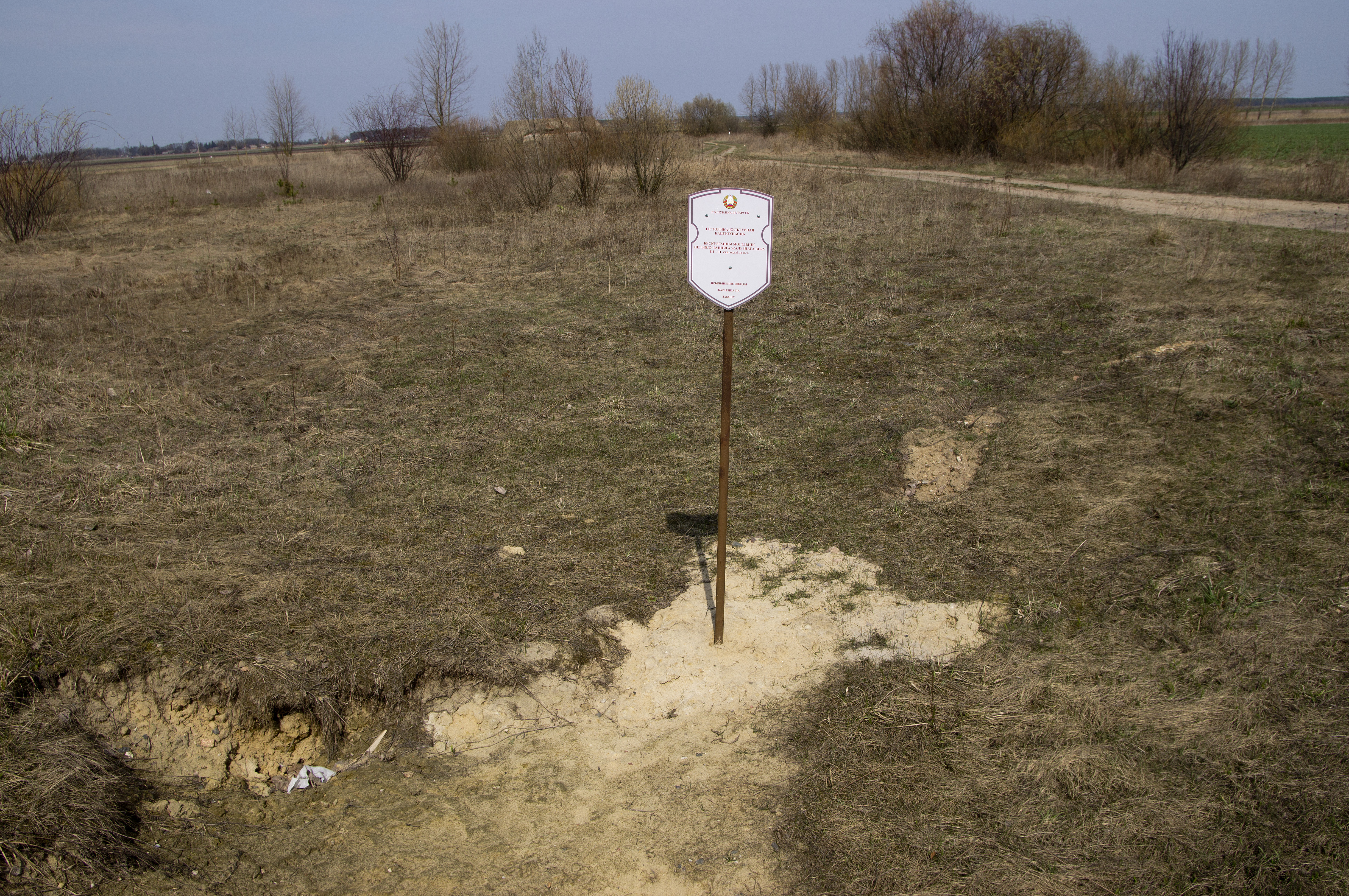 Беларуская (тарашкевіца): Бескурганны могільнік пэрыяду раньняга жалезнага веку. г. Драгічын This is a photo of Belarusian heritage monument. Reference number: 113Г000179 ( WLM)